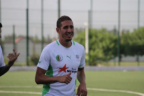 L'international algérien Ishak Belfodil durant un regroupement de l'équipe d'Algérie de football le 12 août 2013 à Alger.